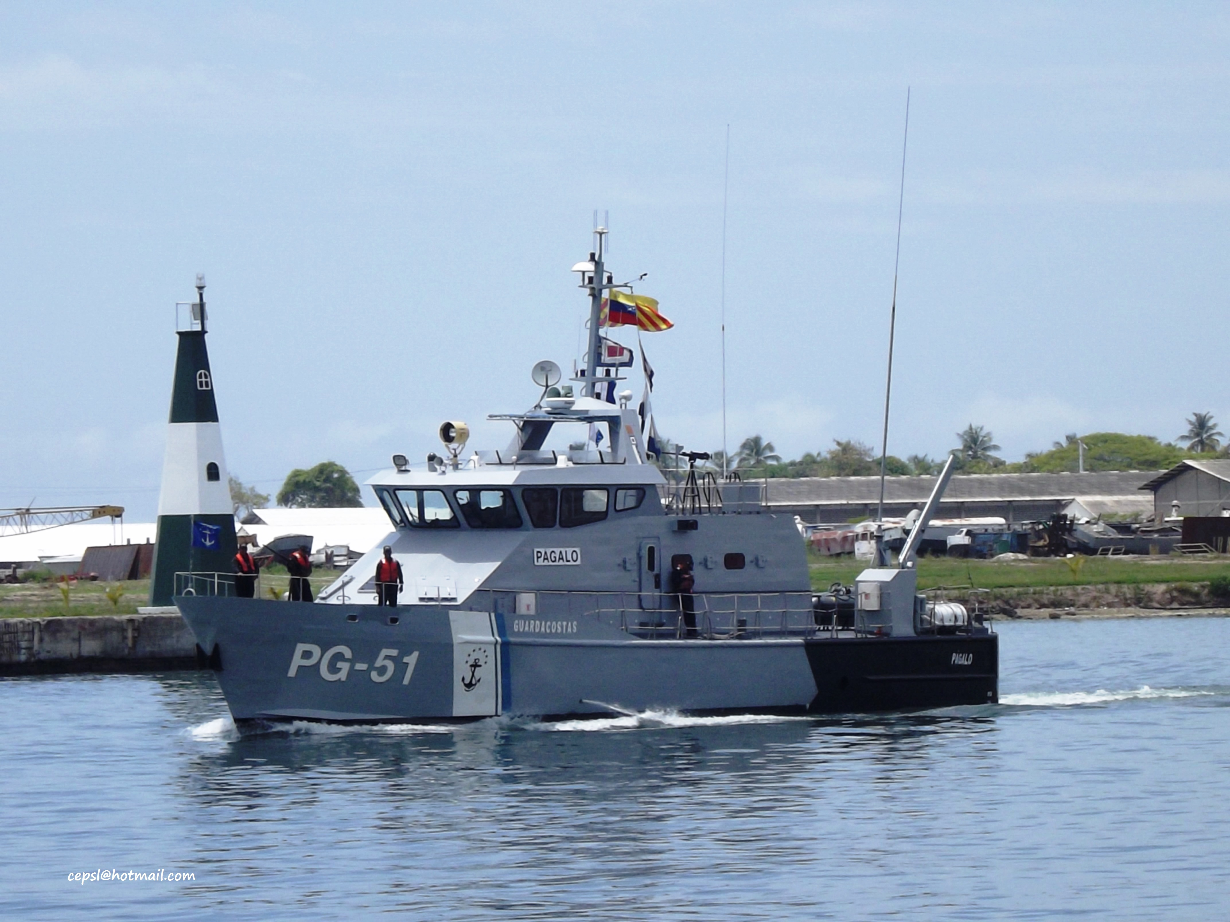 Clase Págalo tipo PB Patrulleros Costeros - PG-51 Págalo